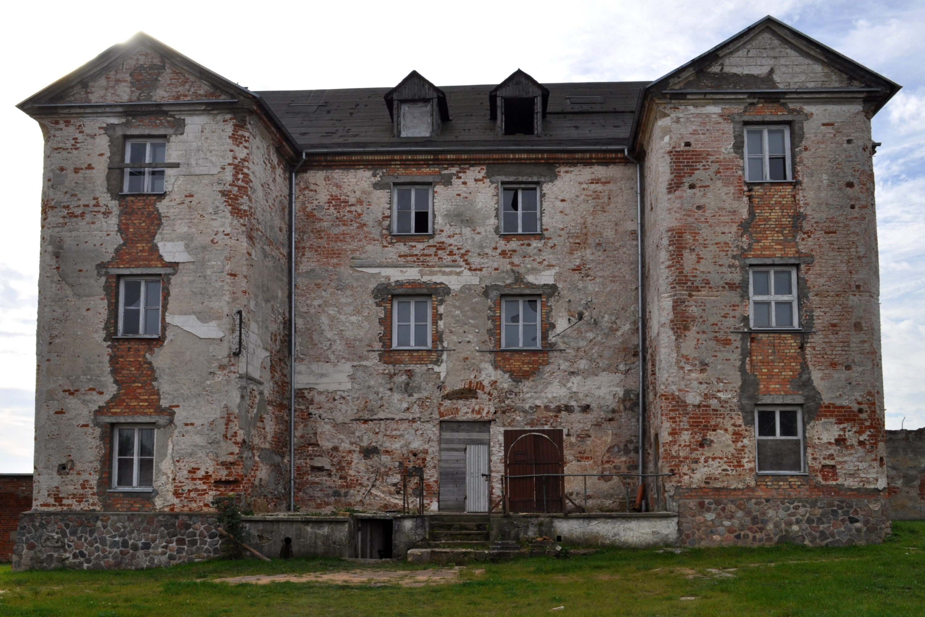 Ełk - widok na front budynku dawnego zamku